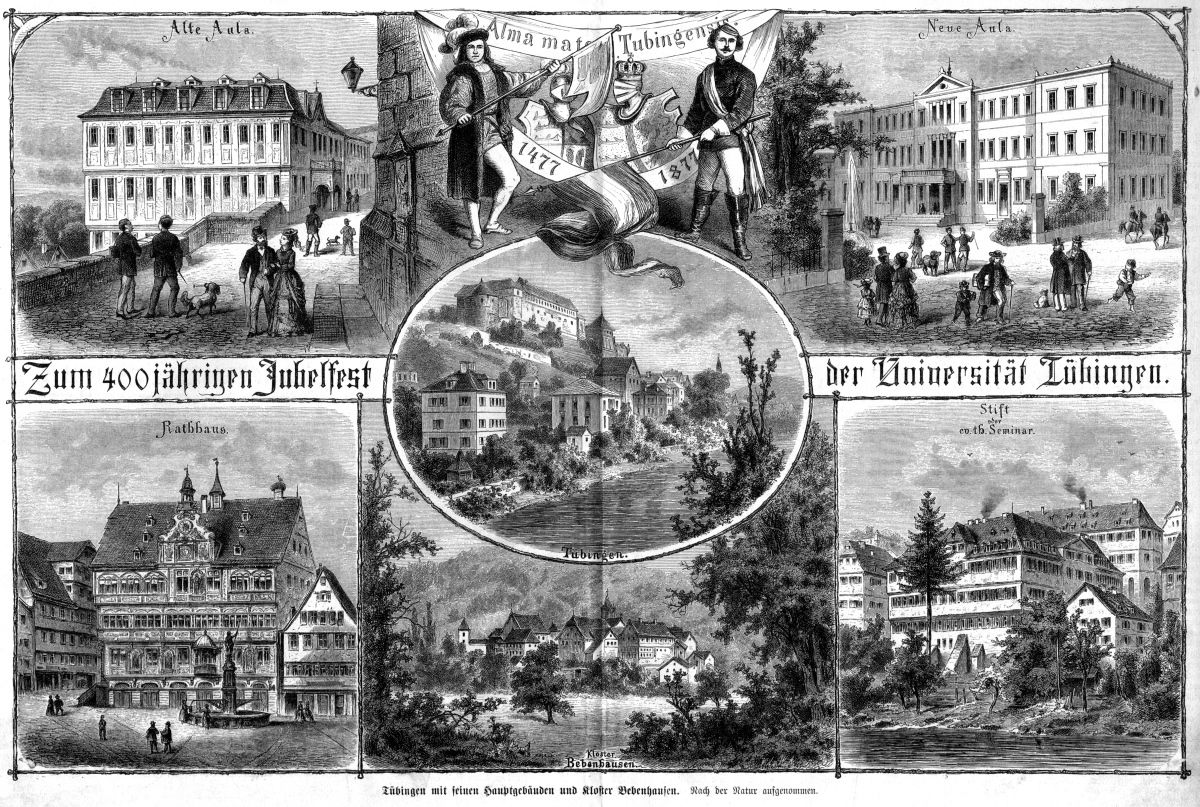 „Zum 400jährigen Jubelfest der Universität Tübingen“, Holzstich 49,5 × 26 cm.